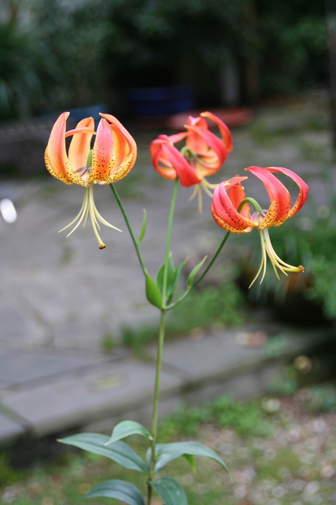 Lilium pyrophilum Inflorescence Lilium pyrophilum